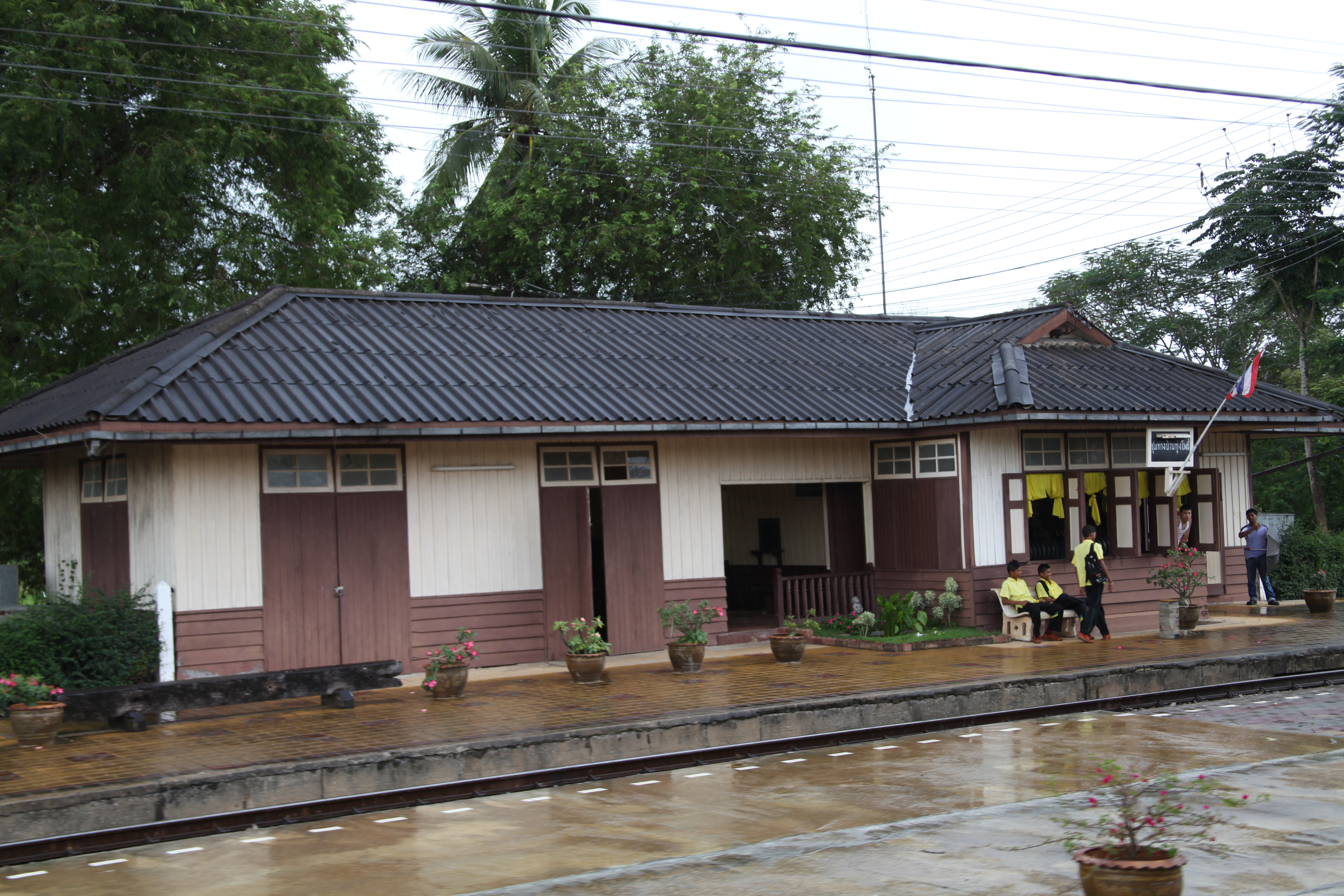 バーントゥンポー駅